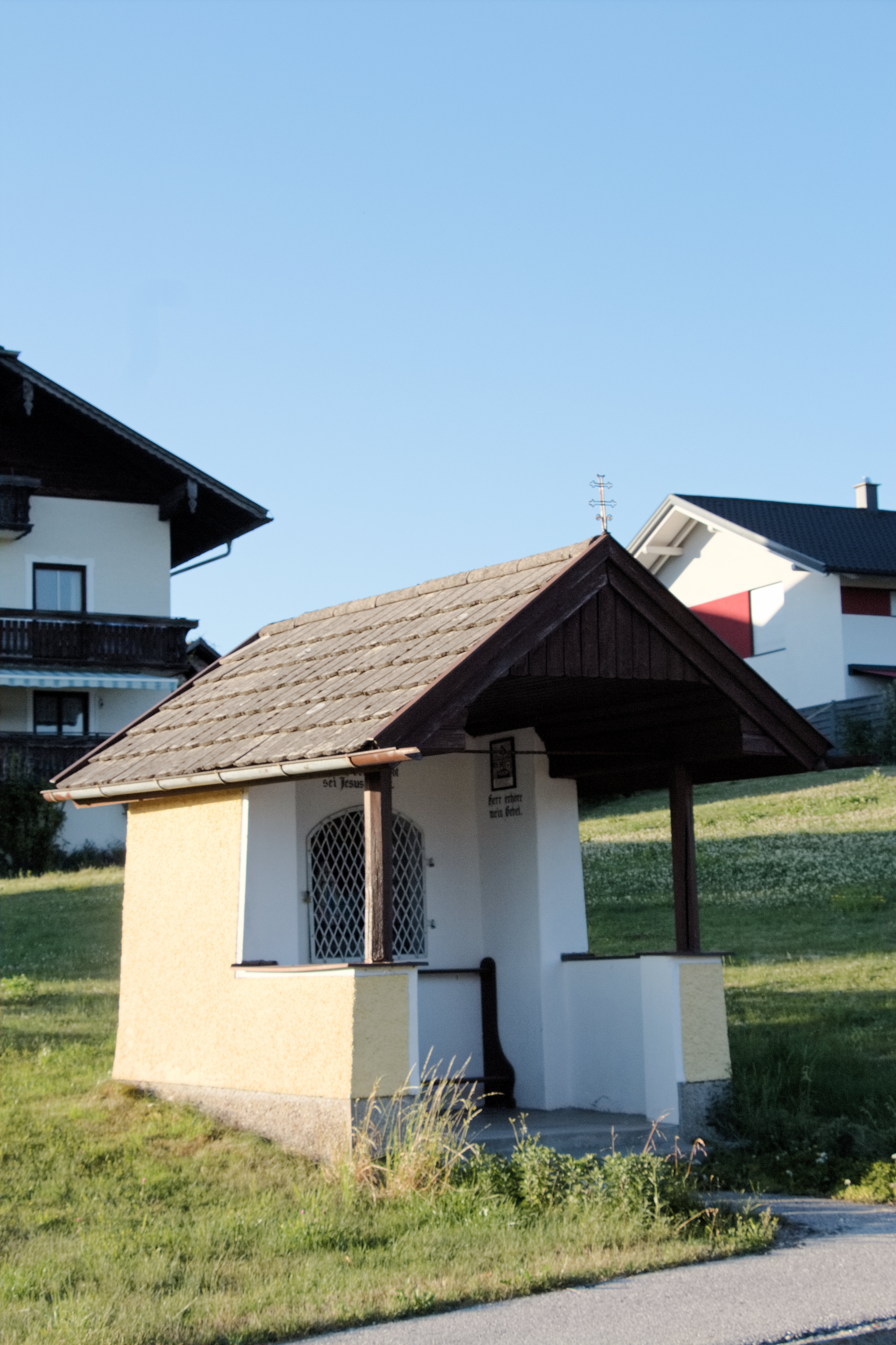 Göming (Bezirk Salzburg-Umgebung), Ortsteil Kemating: Lippenbauerkapelle